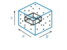 جستجوی بازه‌ای 3بُعدی